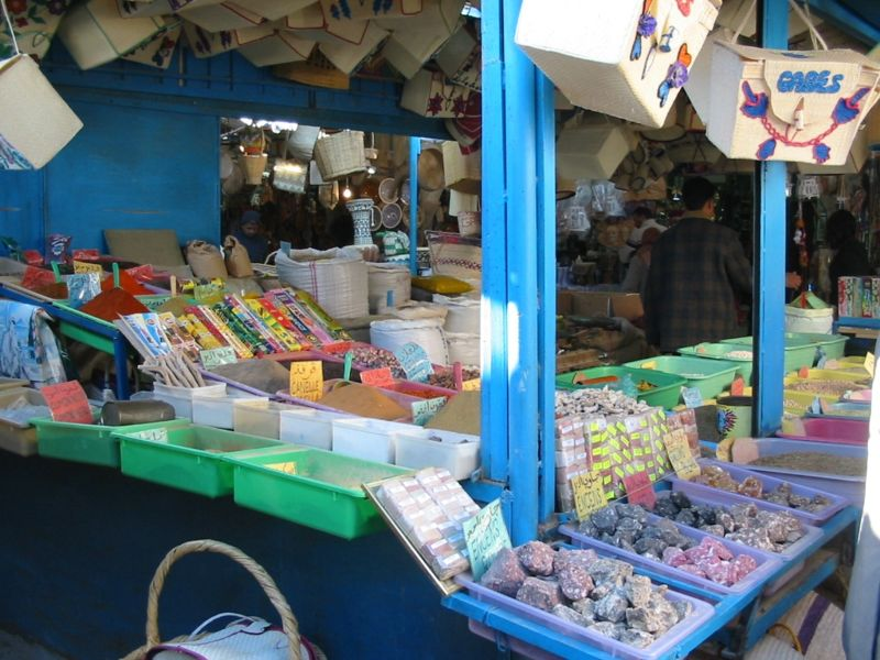 Photographie personnelle prise en décembre 2004, représentant une boutique vendant des épices au souk de Gabès en Tunisie.